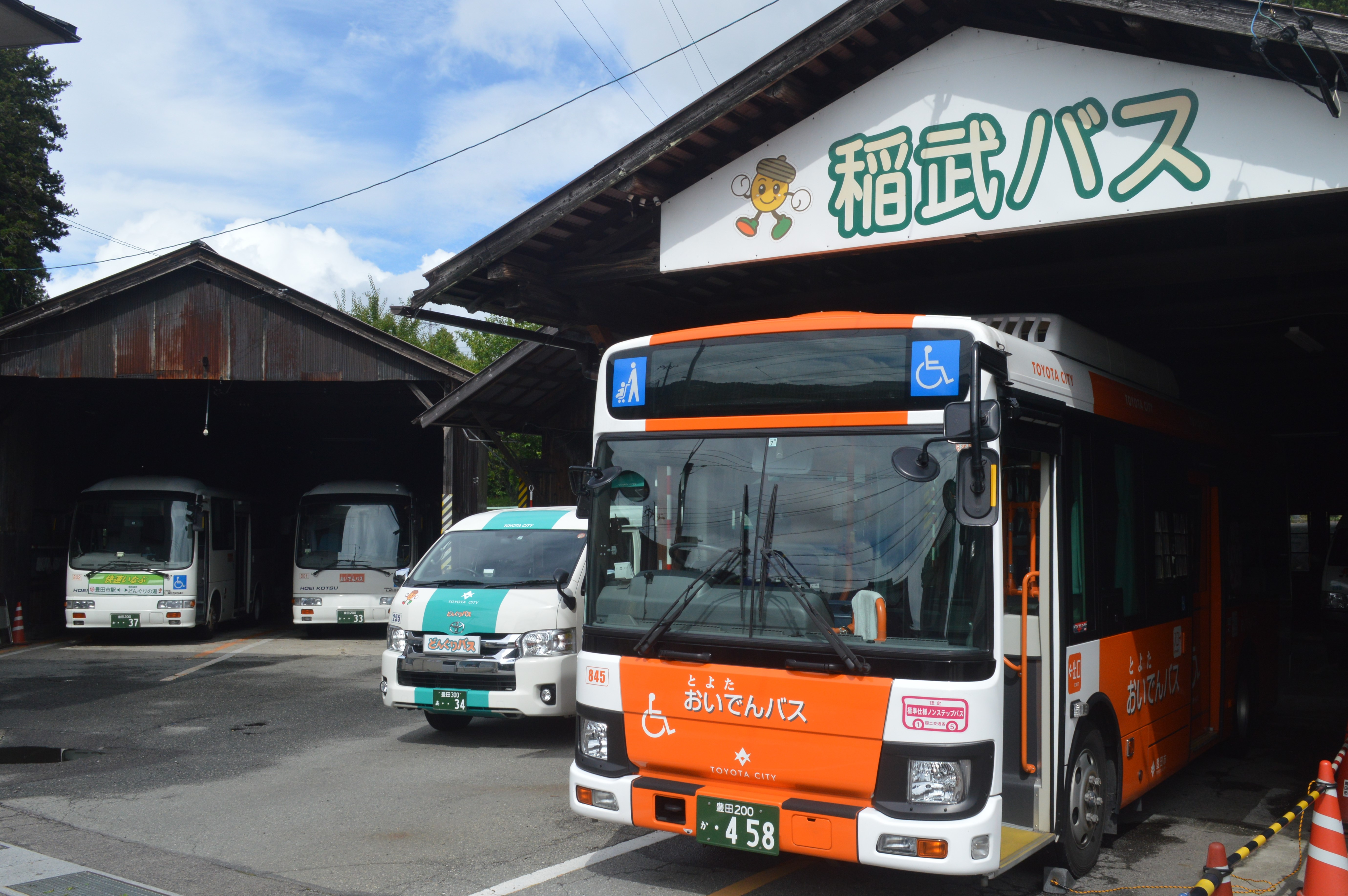 愛知県豊田市の稲武地区。稲武町にある稲武バスセンター。